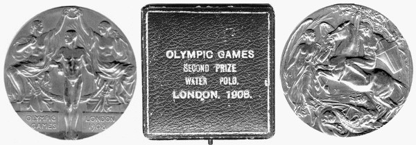 Jeux Olympiques Londres 1908 - Water Polo - Médaille d'argentÆnglisc: Olympic Games - Second prize - Water Polo - London 1908